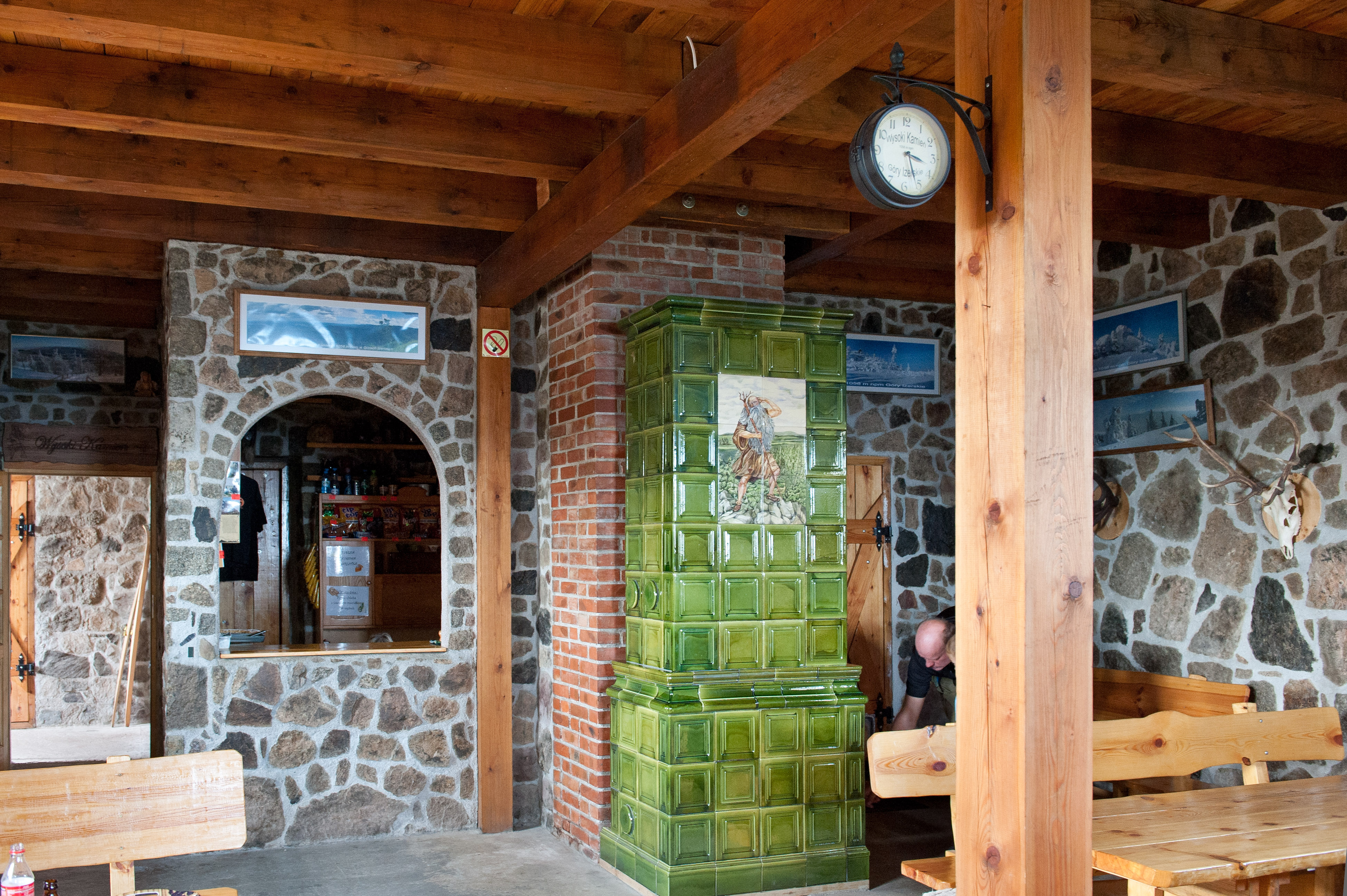 Wysoki Kamień, schronisko turystyczne w Górach Izerskich, 1058 m npm.